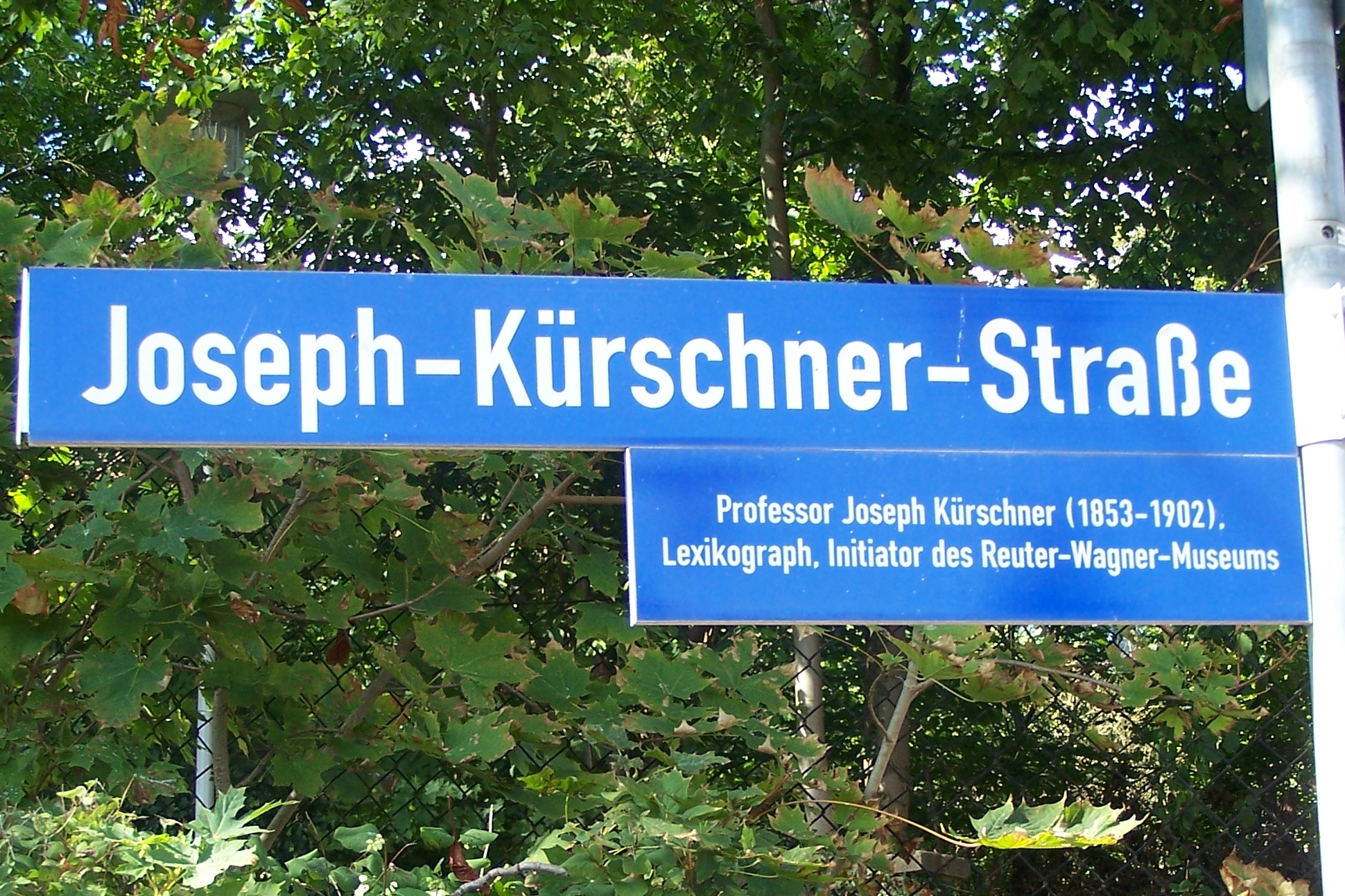 Straßenschild und Erläuterung zur Joseph-Kürschner-Straße.